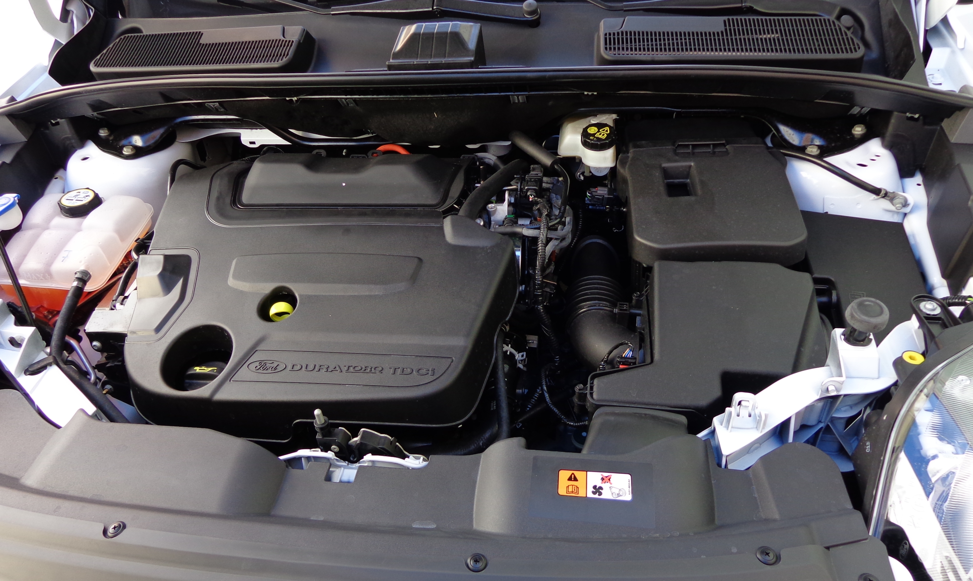 Motor eines Ford Kuga.